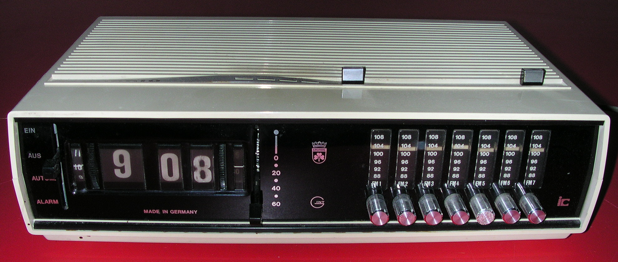 Grundig Sonoclock 300 Radiowecker mit Digitaluhr, 7 UKW-Festsender